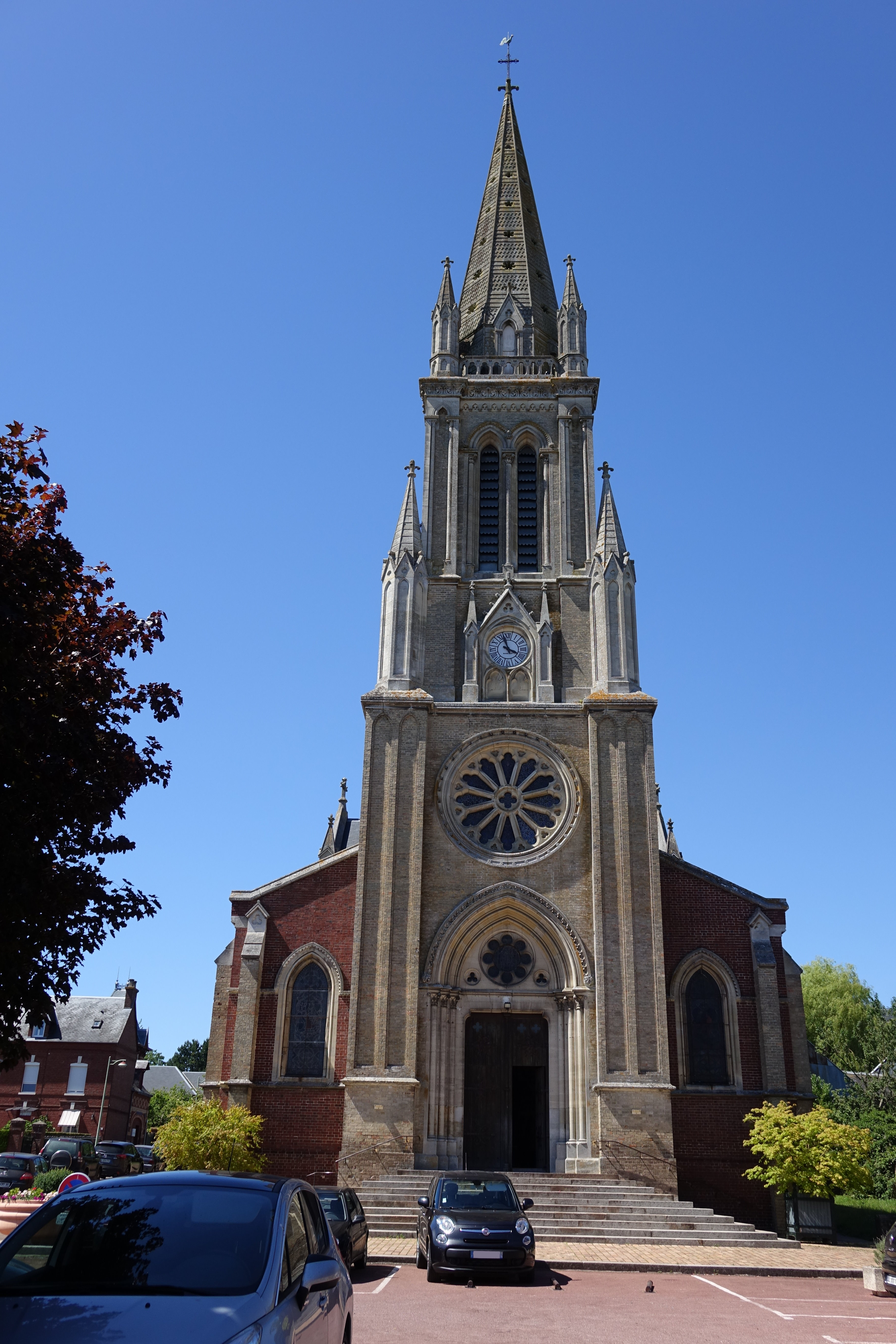 Église Saint Eloi à Forges-les-Eaux, Seine-Maritime, France